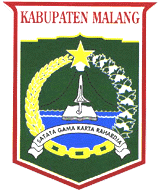 SATTATA GAMA KARTA RAHARJA